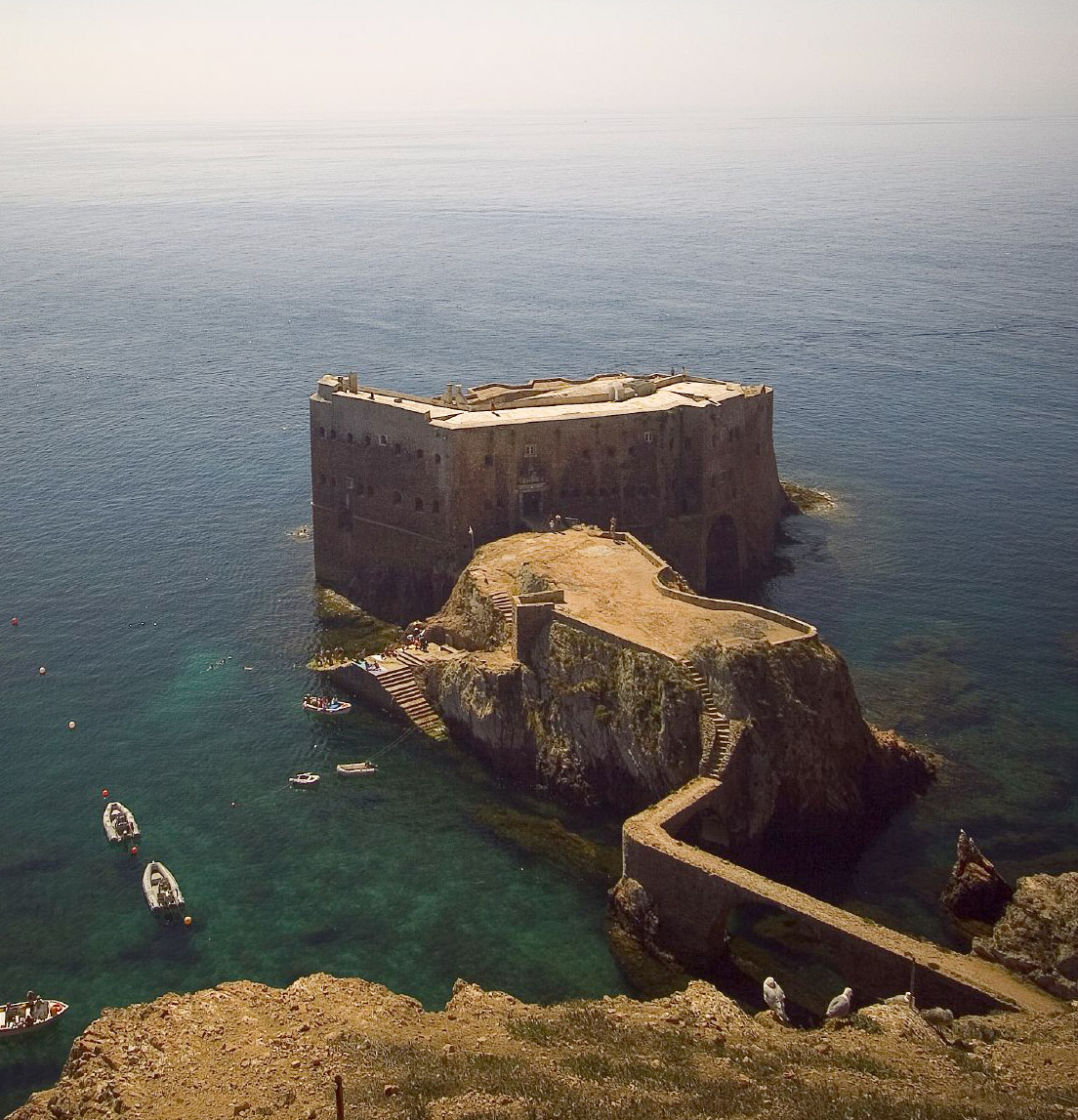 Berlengas Fortress in Peniche, Portugal